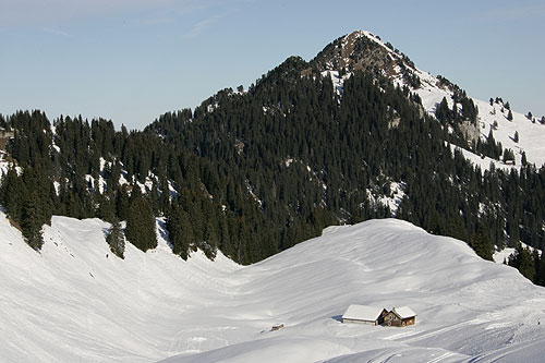 Hoch-Ybrig